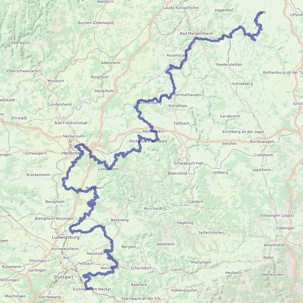 Württembergischer Weinwanderweg. Gerendert mit UMap (Outdoors (OSM)). Streckendaten von hier: /